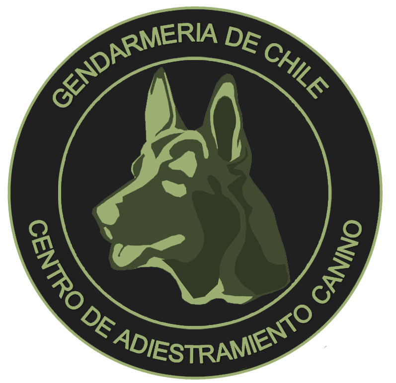 Escudo ECA